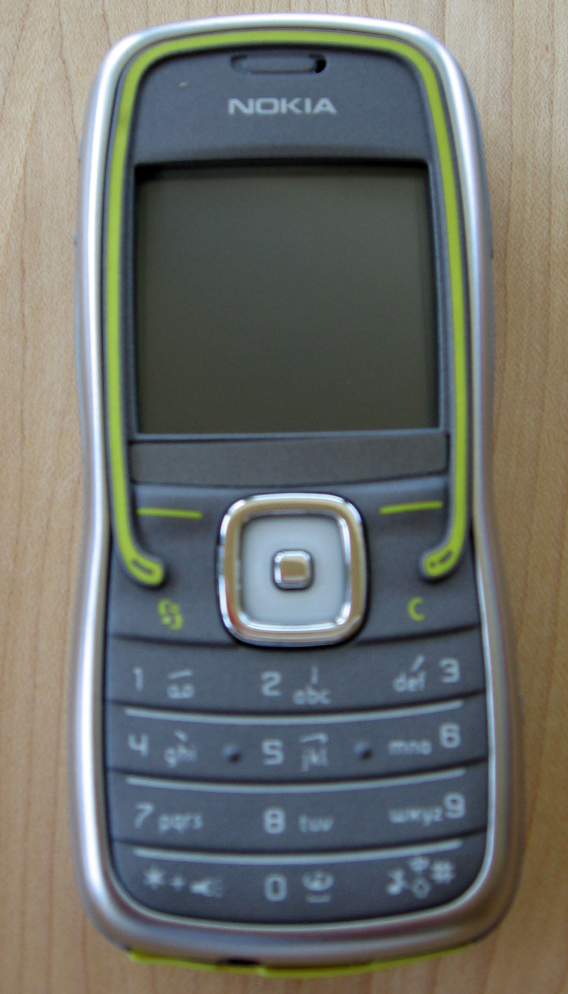 Photo d'un Nokia 5500